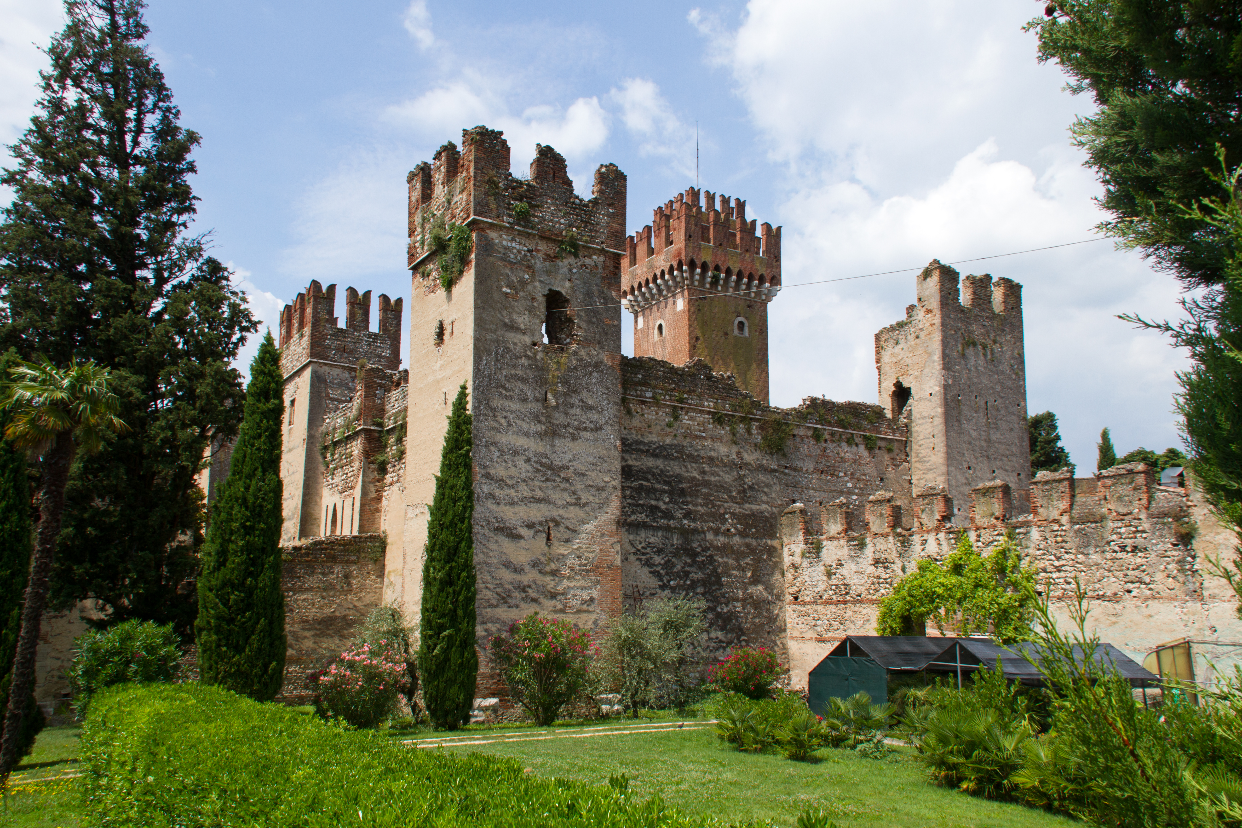 Lazise Castle 2